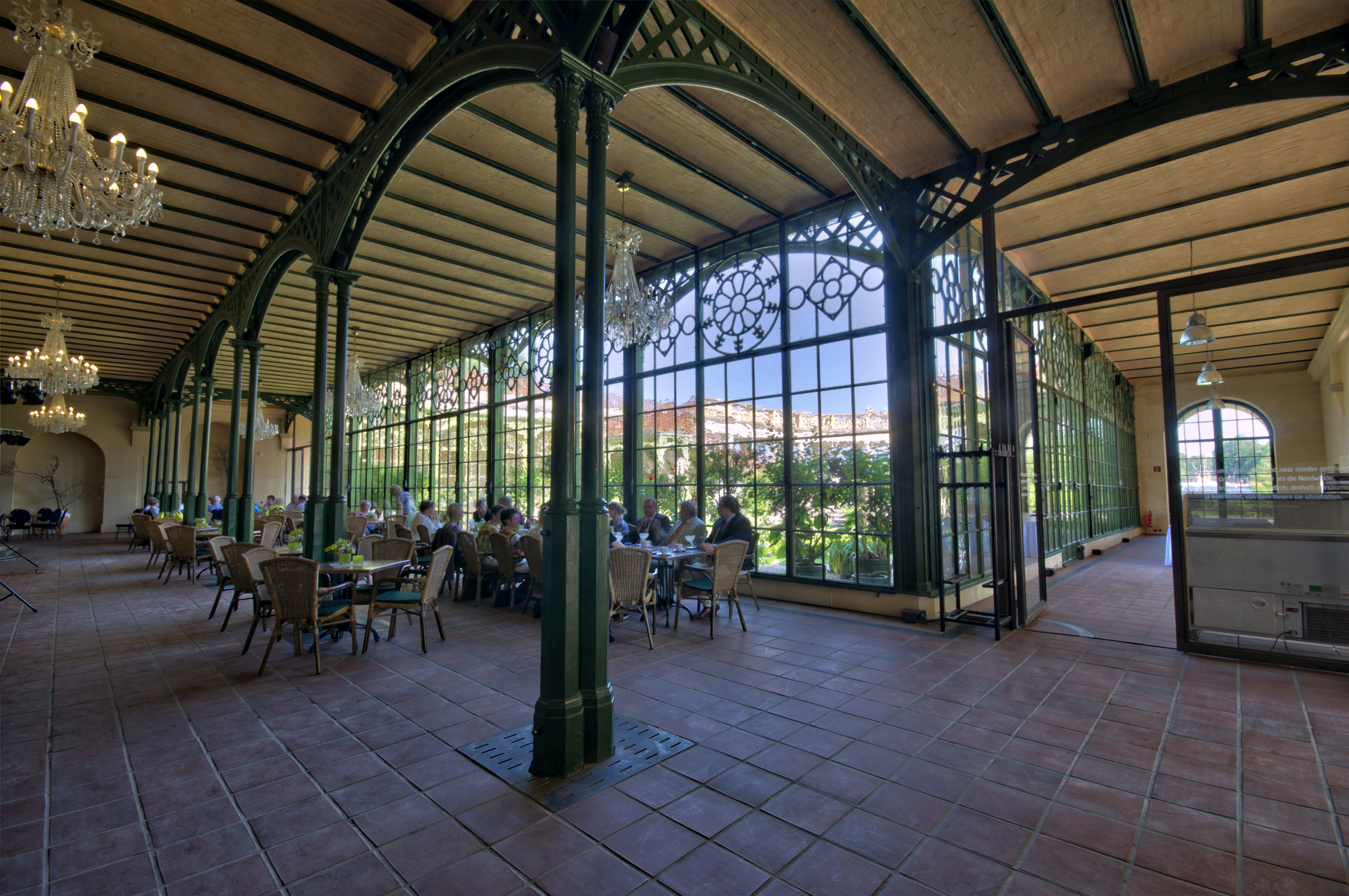 Schweriner Schloß; Orangerie und Schloßgarten